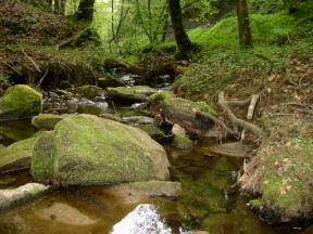 d' Steebaach laanscht d' Velospist um Scheedgen.